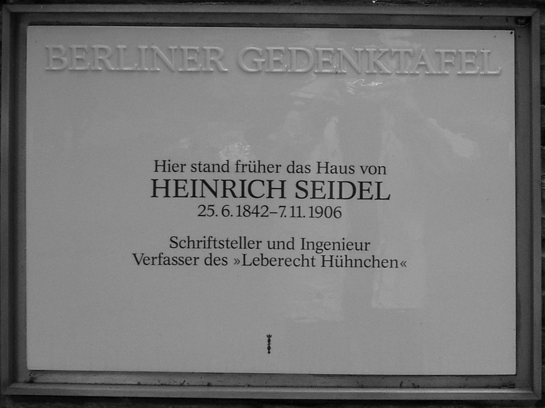 Gedenktafel in 12207 Berlin-Lichterfelde, Boothstraße 30. Auf dem Grundstück Boothstraße 29 befand sich das Haus von Heinrich Seidel (1842-1906), deutscher Dichter und Ingenieur.